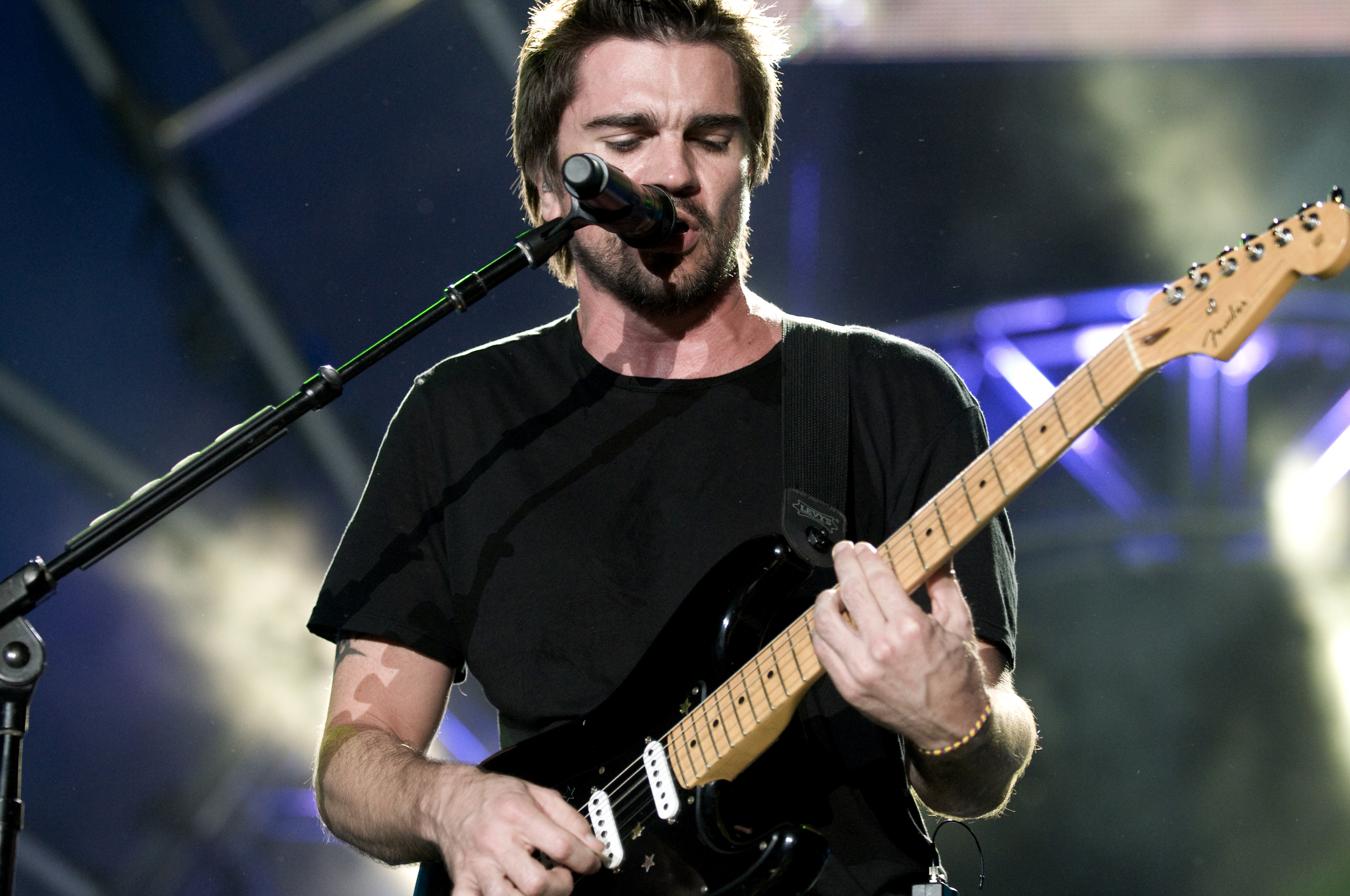 Juanes